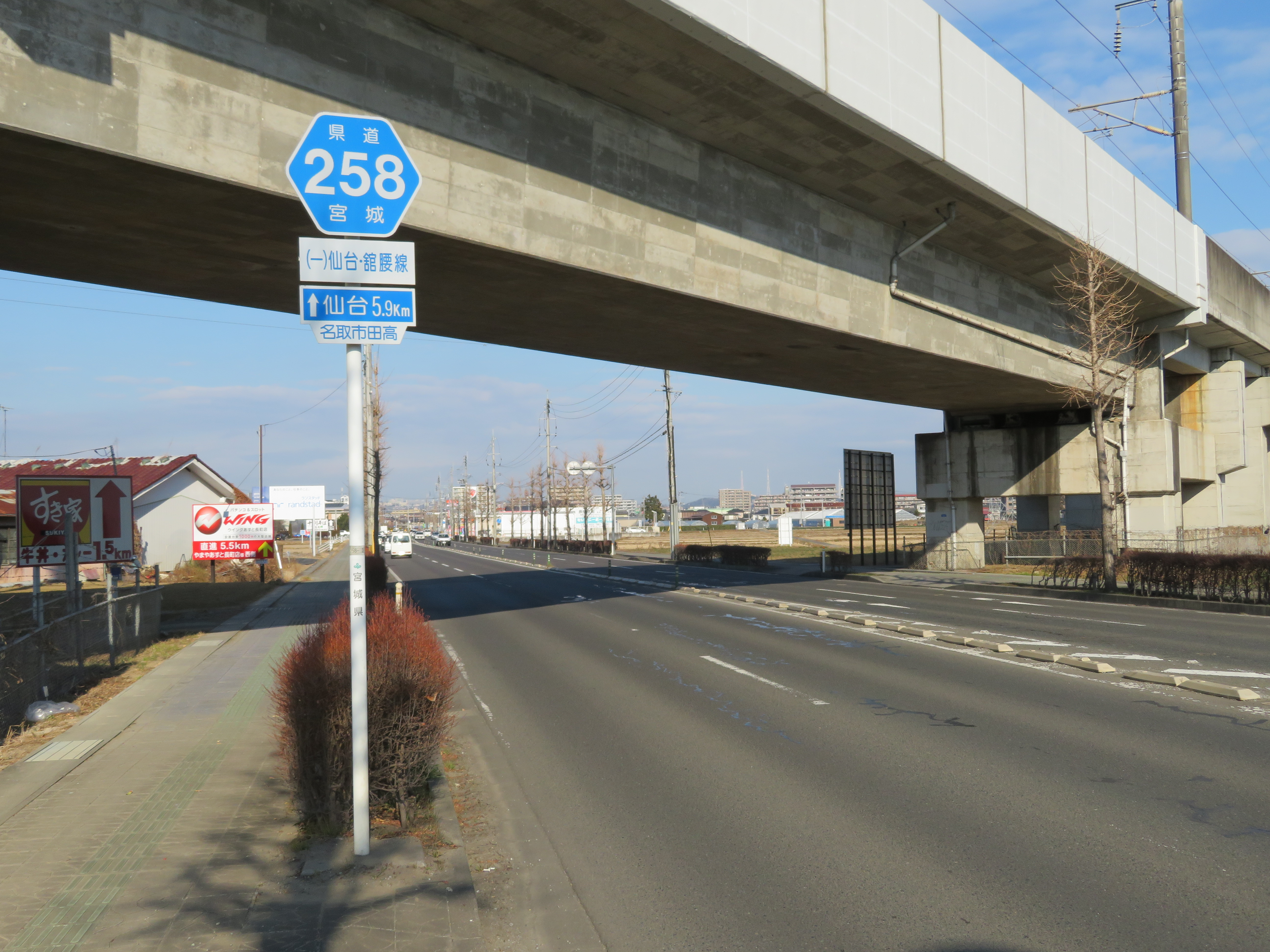 宮城県道258号線名取市田高付近（仙台方面を撮影） Canon PowerShot SX720 HS